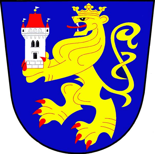 Znak obce Přílepy (okres Kroměříž)